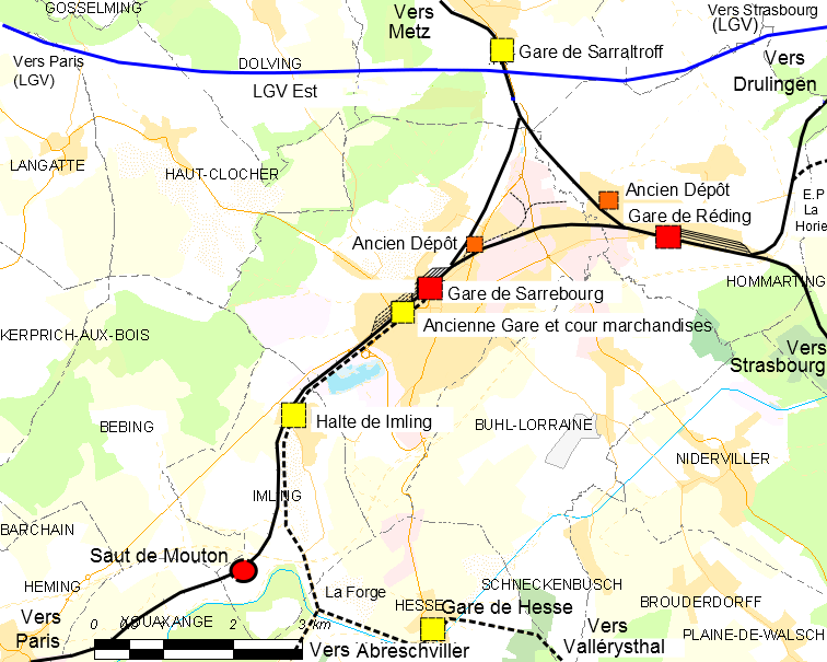 Plan des lignes du secteur ferroviaire de Sarrebourg – Réding. En rouge : gares ouvertes. En jaune : gares fermées. Trait épais : voies principales. Trait fin : voies de service, embranchements. Trait bleu : LGV Est, phase 2 (en construction). Pointillés : voies déposées.